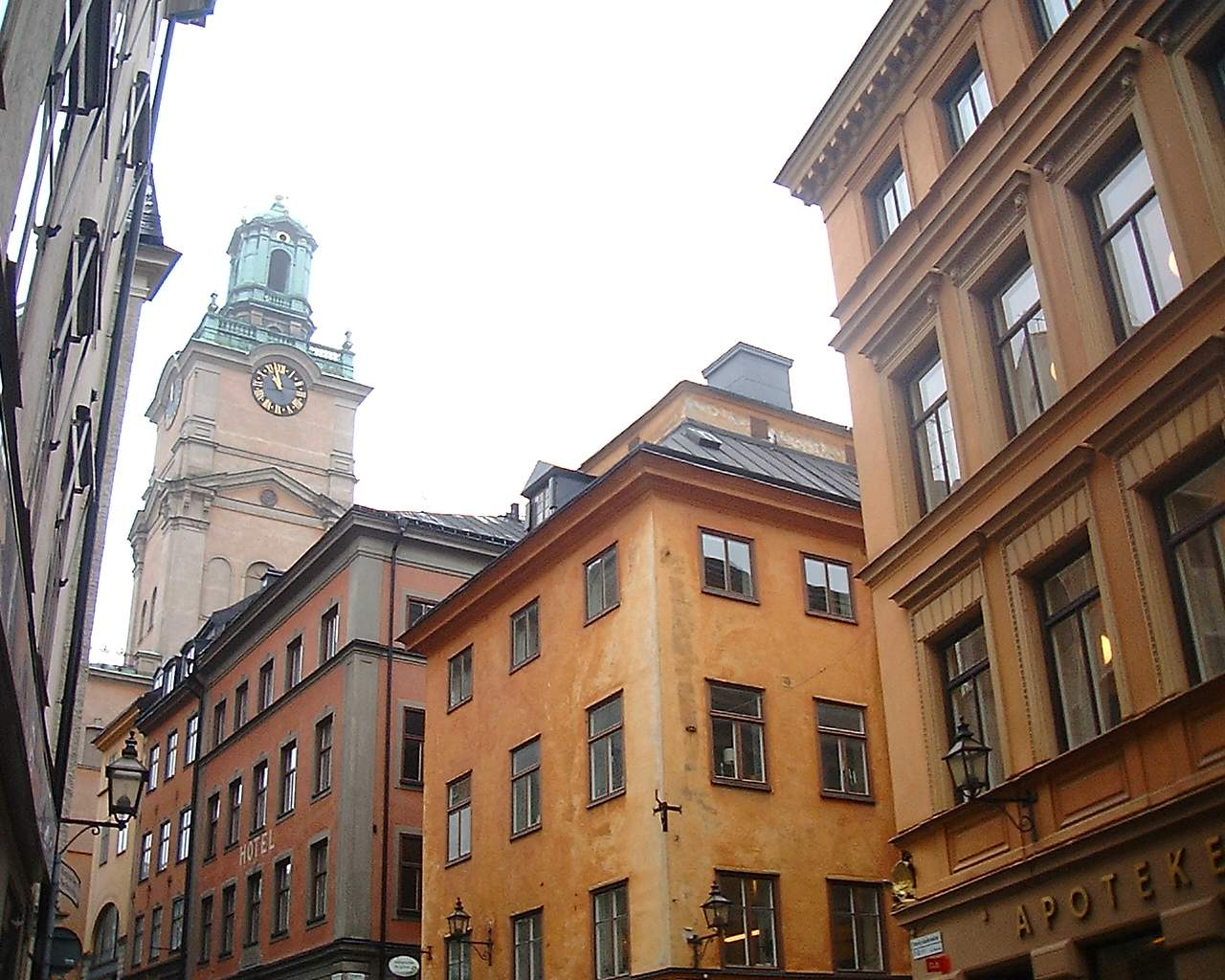 A photo from Storkyrkobrinken showing the so called Säteritak of 18, Prästagatan/19, Västerlånggatan. In the background is Storkyrkan